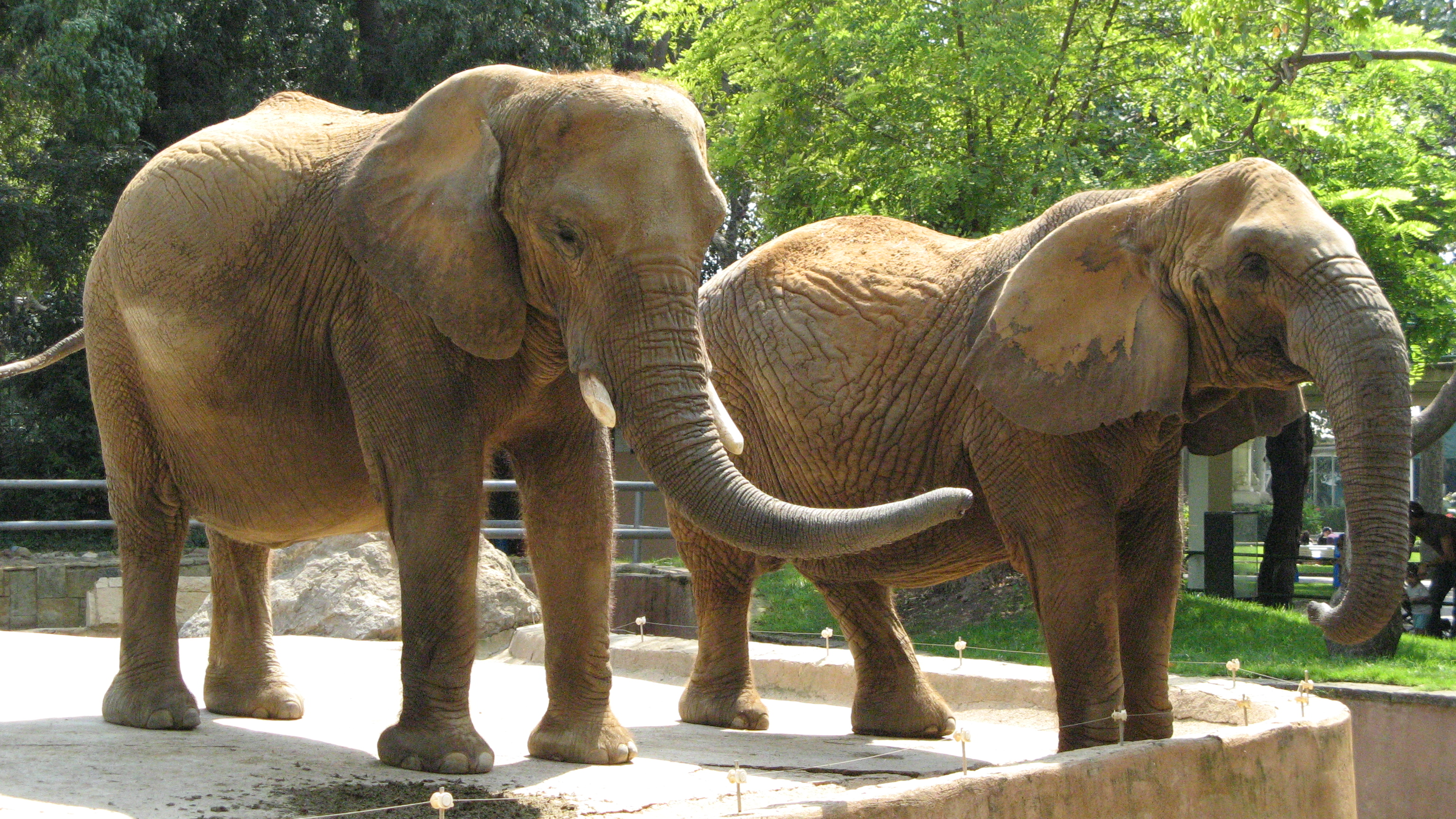 Les éléphantes d'Afrique du zoo de Barcelone, Susi et Alicia, en septembre 2007